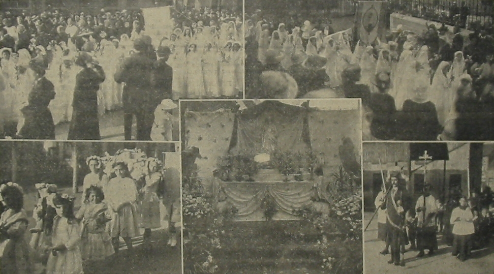 Nrf: D'la Vielle Chronique, Jèrri